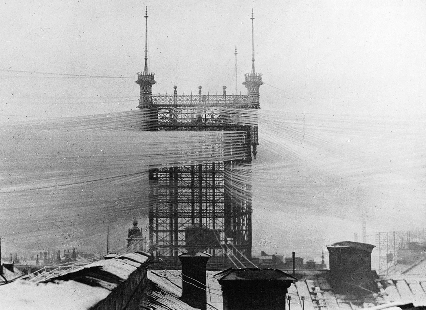 Telefontornet i Stockholm ca 1890, ledningar med rimfrost.